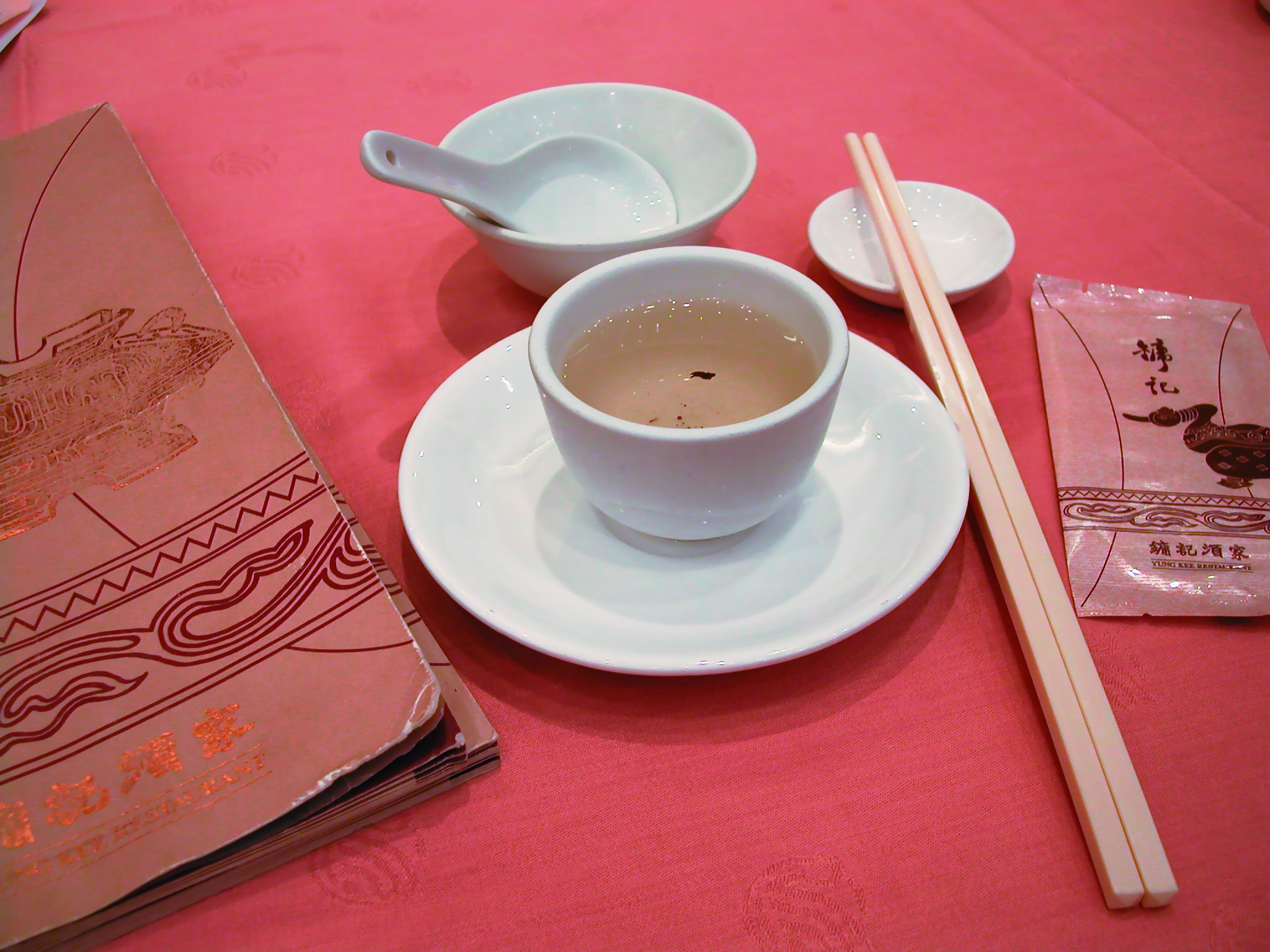 Yumcha eating utensils